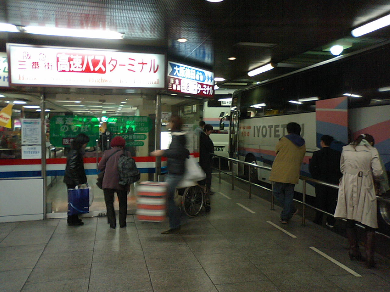 Hankyu Sanbangai Bus terminal, entrance of ticket hall (Umeda,Osaka,Japan)